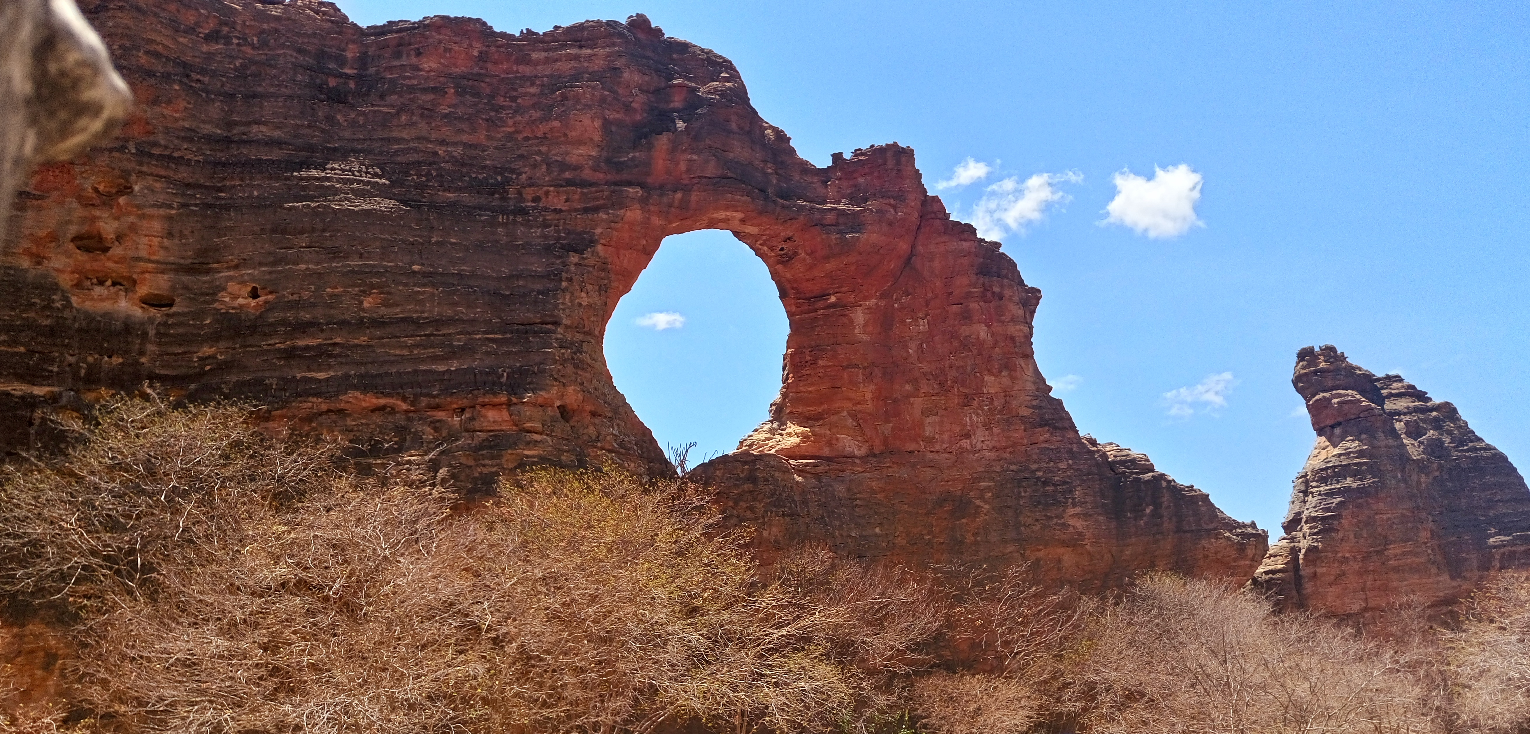 Pedra furada no Parque Nacional Serra da Capivara, no estado do Piauí, Brasil